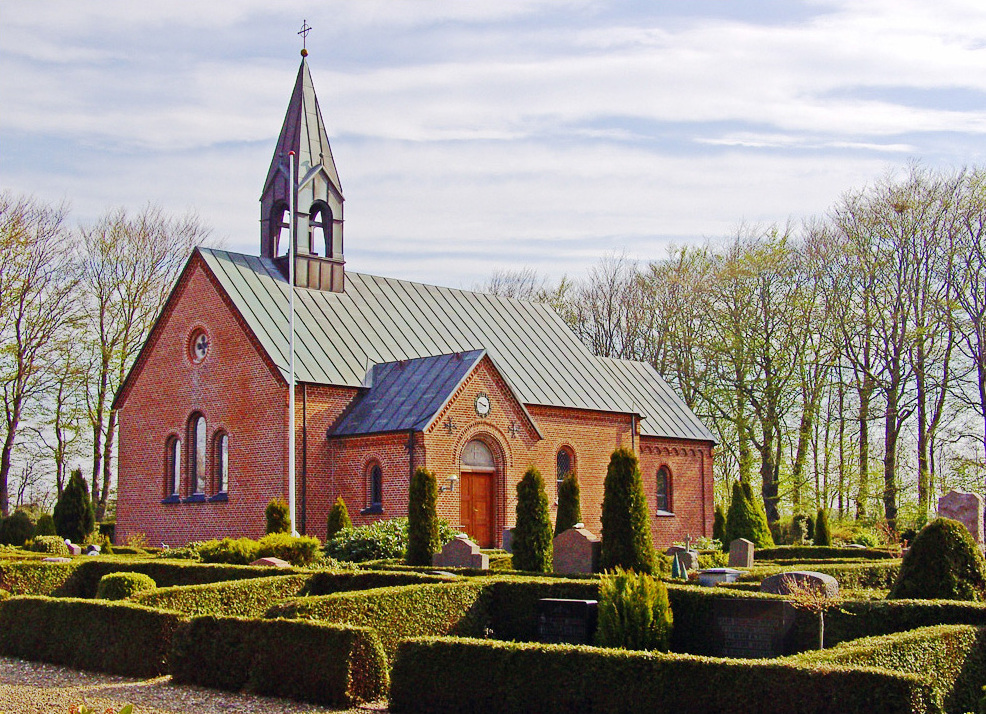 fra sydvest